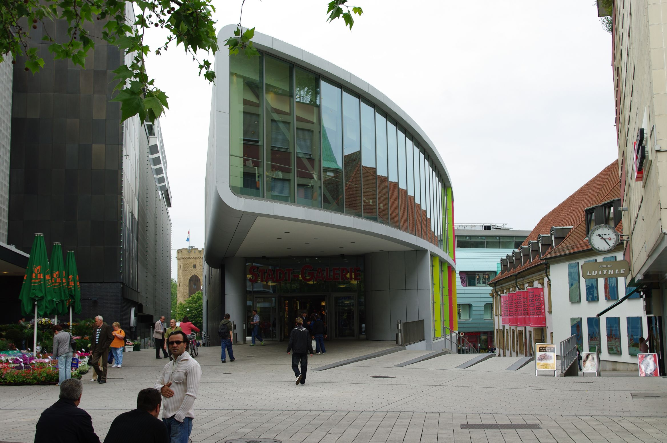 Stadtgalerie Heilbronn (Einkaufsmall), hinten links der Götzenturm, rechts außen das Haus der Stadtgeschichte